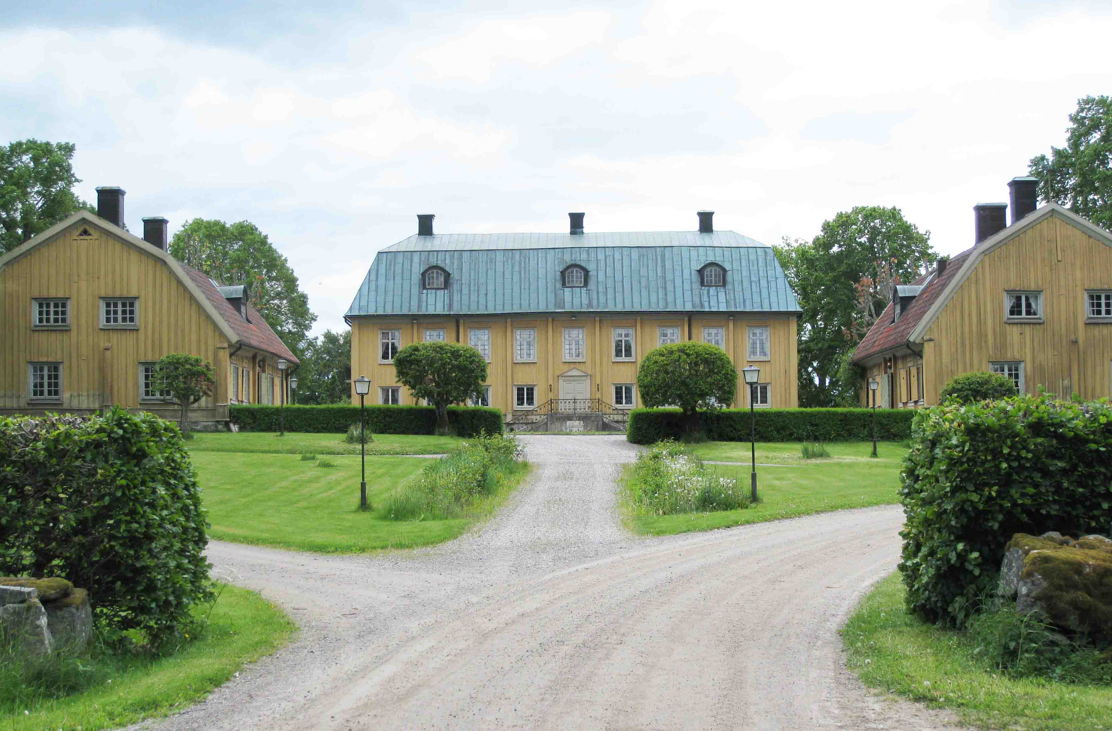 Bålby fotat från allén.